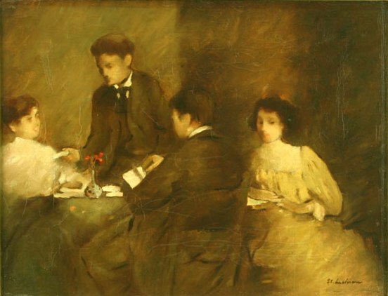 Ştefan Luchian - Reuniune literară, ulei pe pânză